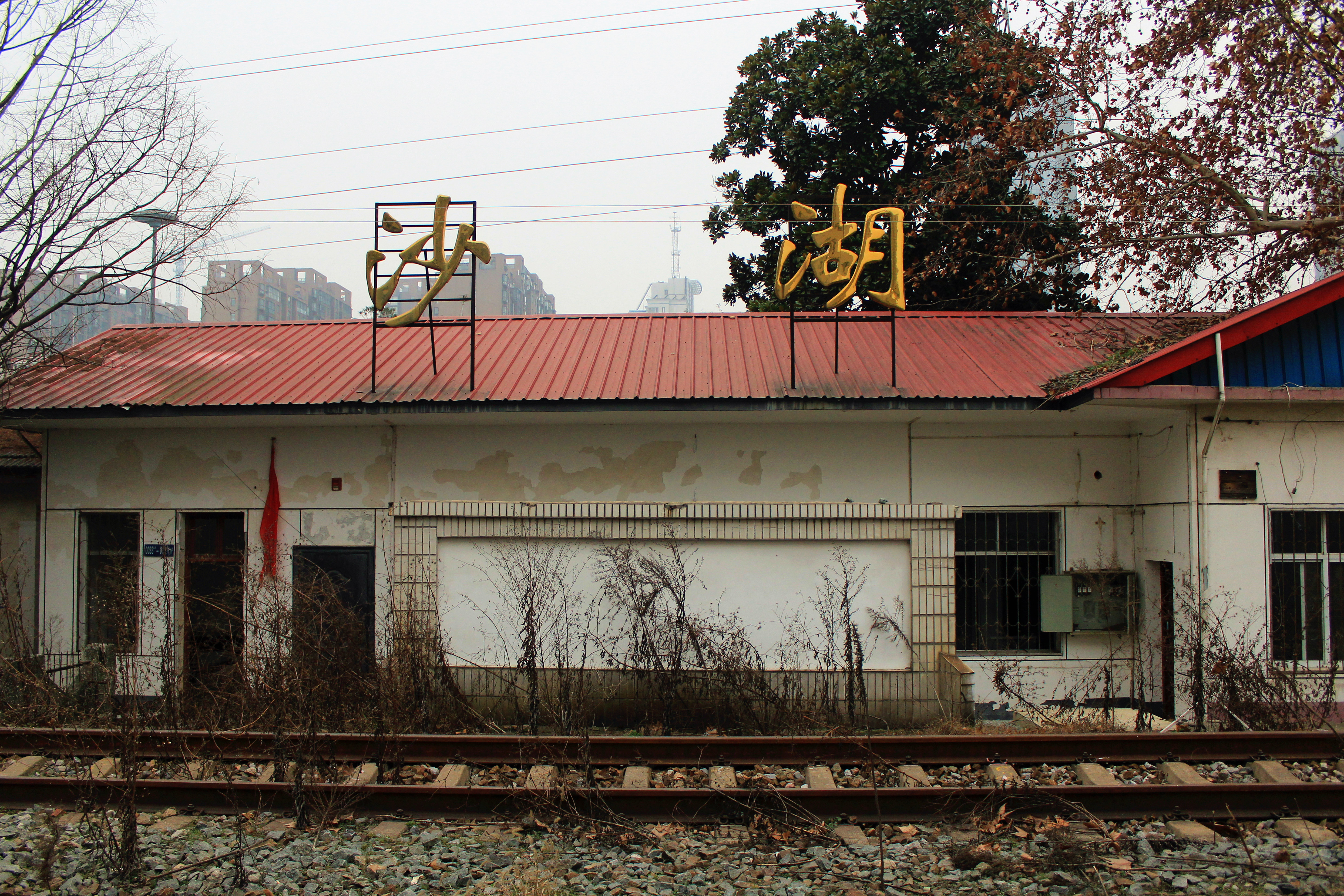 中文（中国大陆）: 已废弃的沙湖站